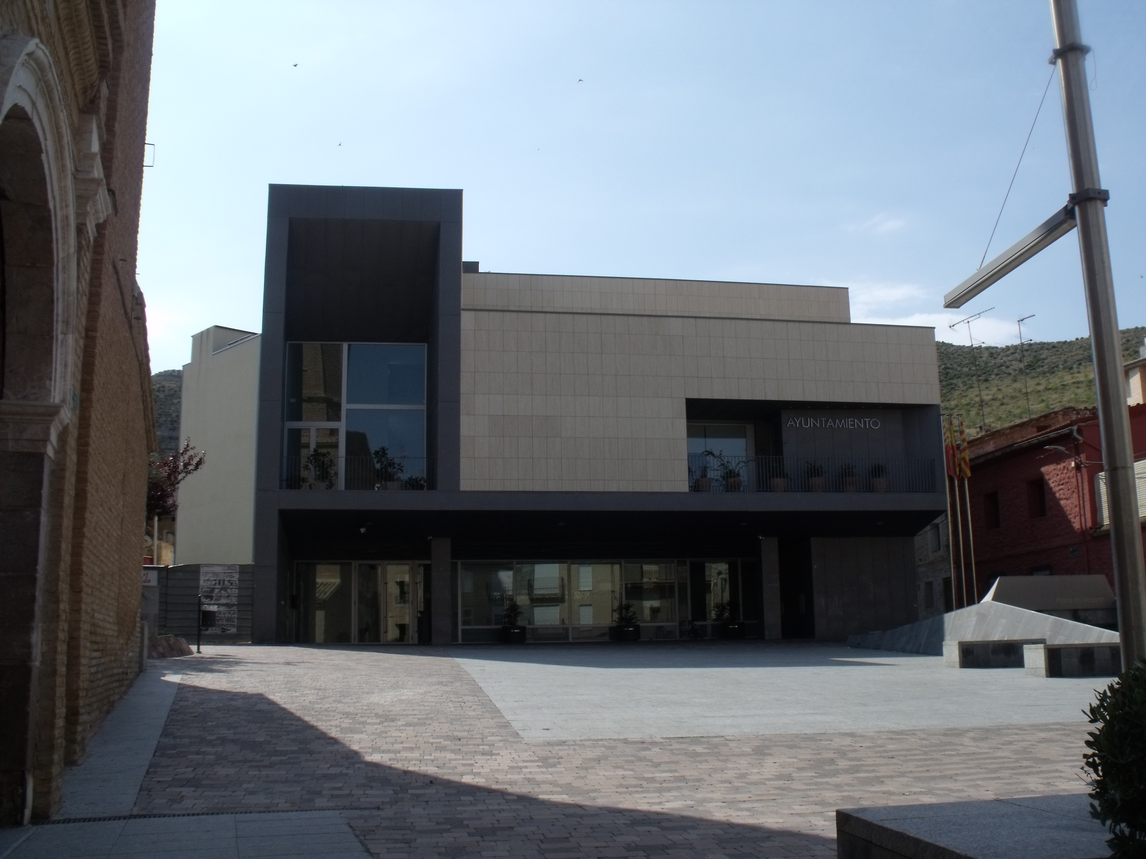 Ayuntamiento de Cadrete